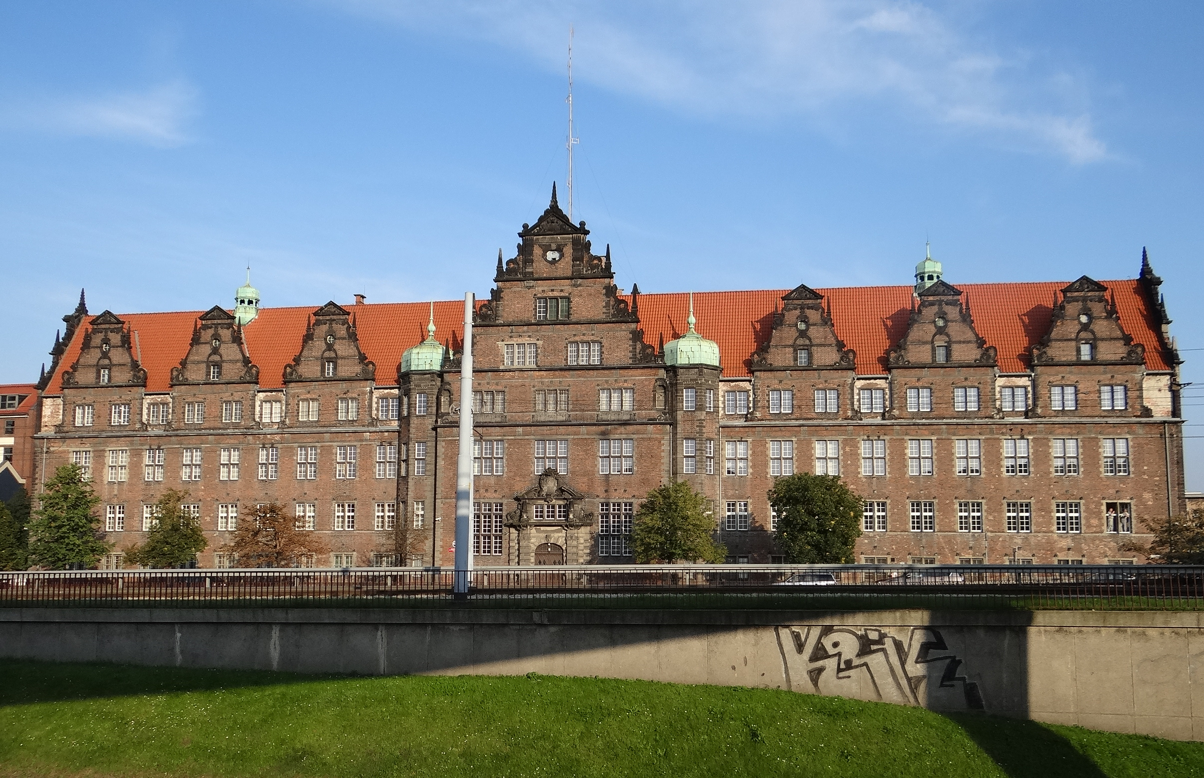 Prezydium Policji (budynek główny, budynek mieszkalny, areszt, łączniki lewy i prawy, fragment zachowanego muru)- ob. delegatura ABW ul. Okopowa 9, Gdańsk.